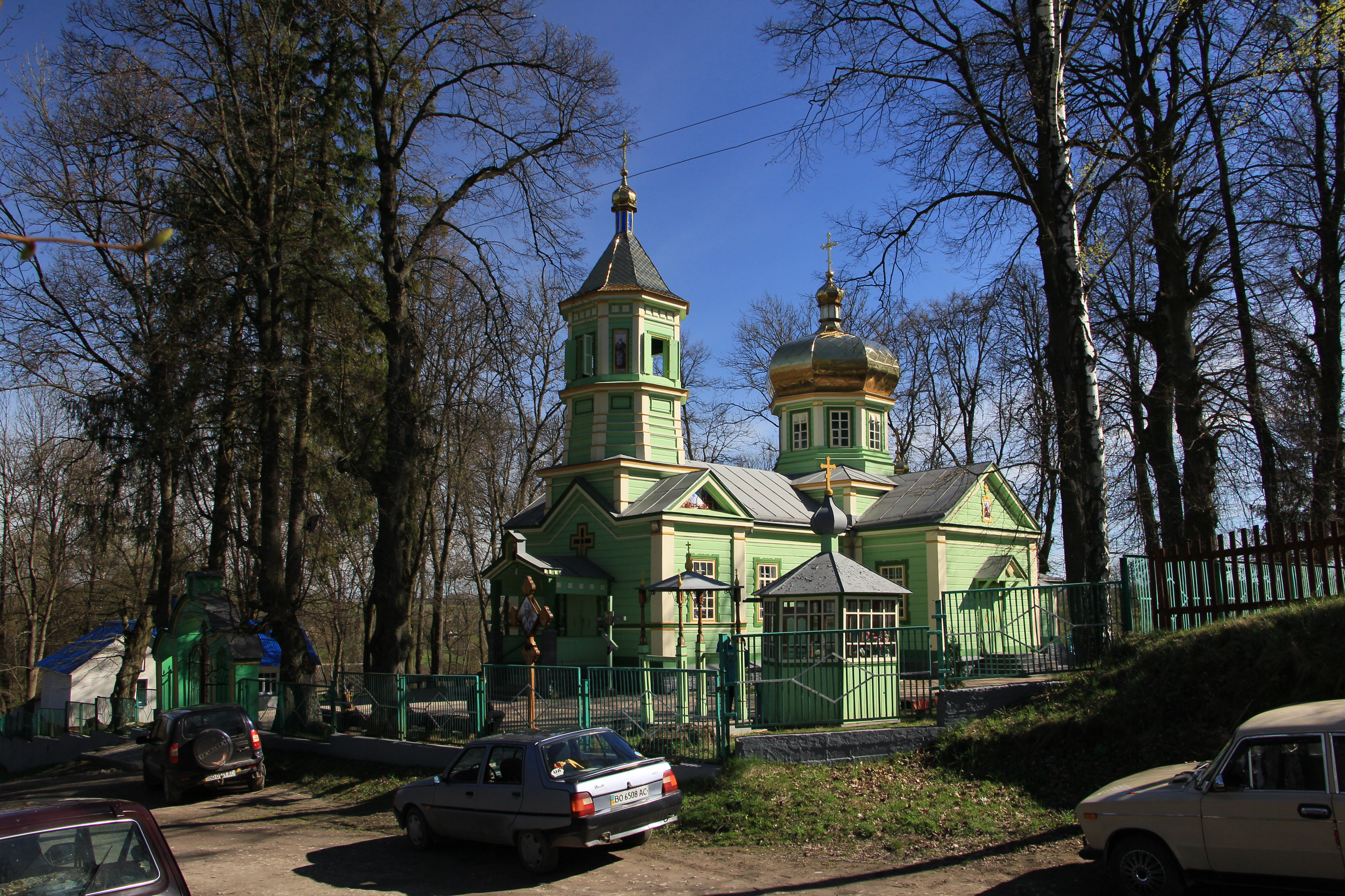 Дерев'яна церква в селі Дзвиняча Збаразького району Тернопільської області